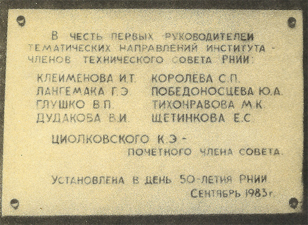 Памятная доска в честь первых членов Технического совета Реактивного научно-исследовательского института.